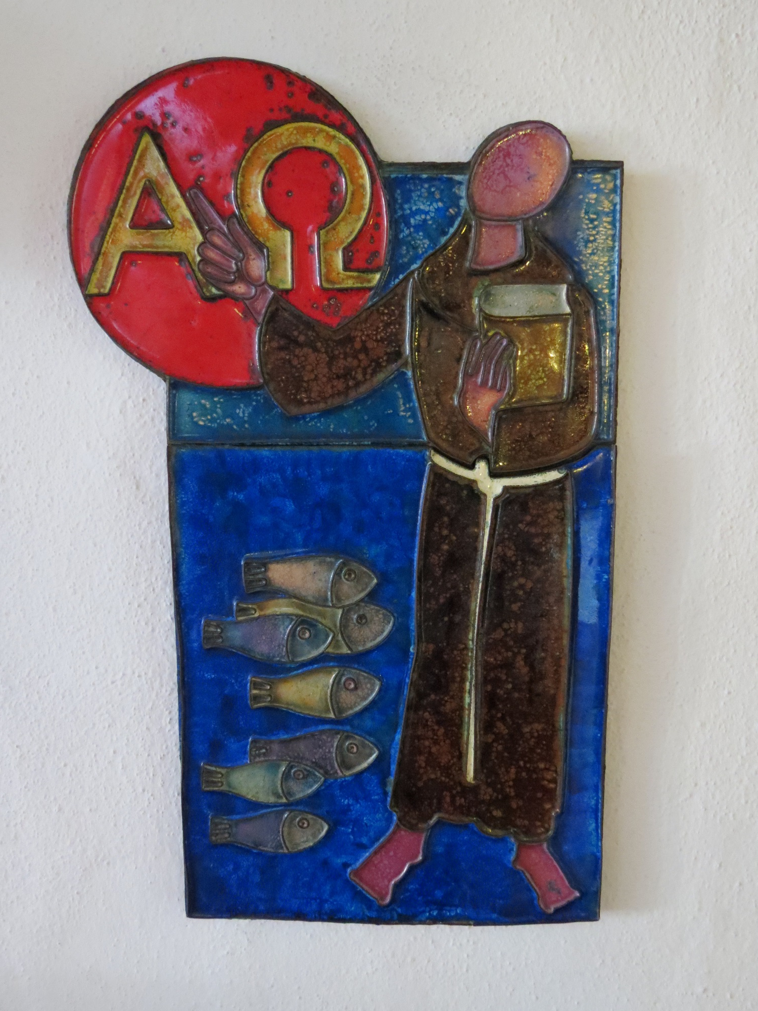 Römisch-katholische Pfarrkirche St. Georg Elgg, Kunstwerk von Christof Zünd